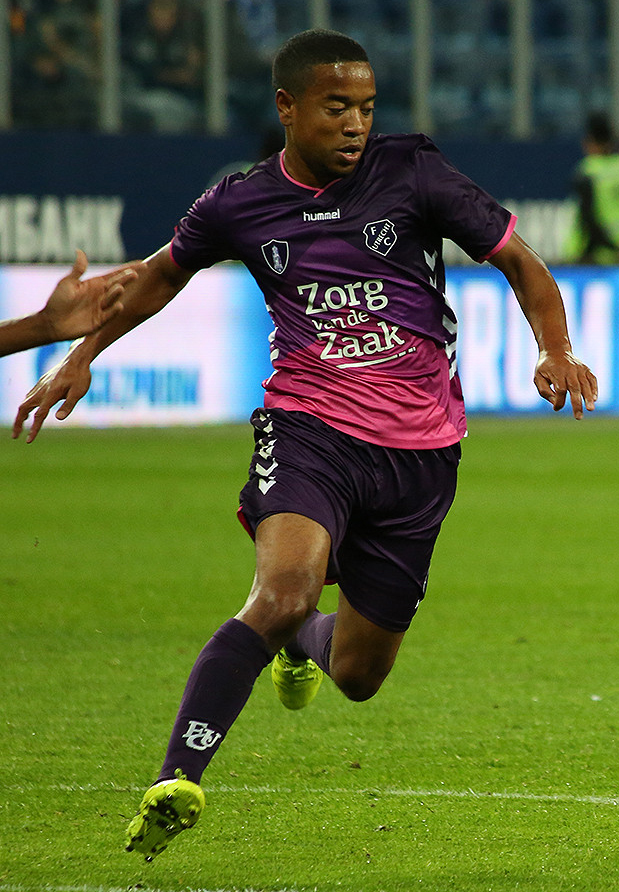 «Зенит» - «Утрехт»